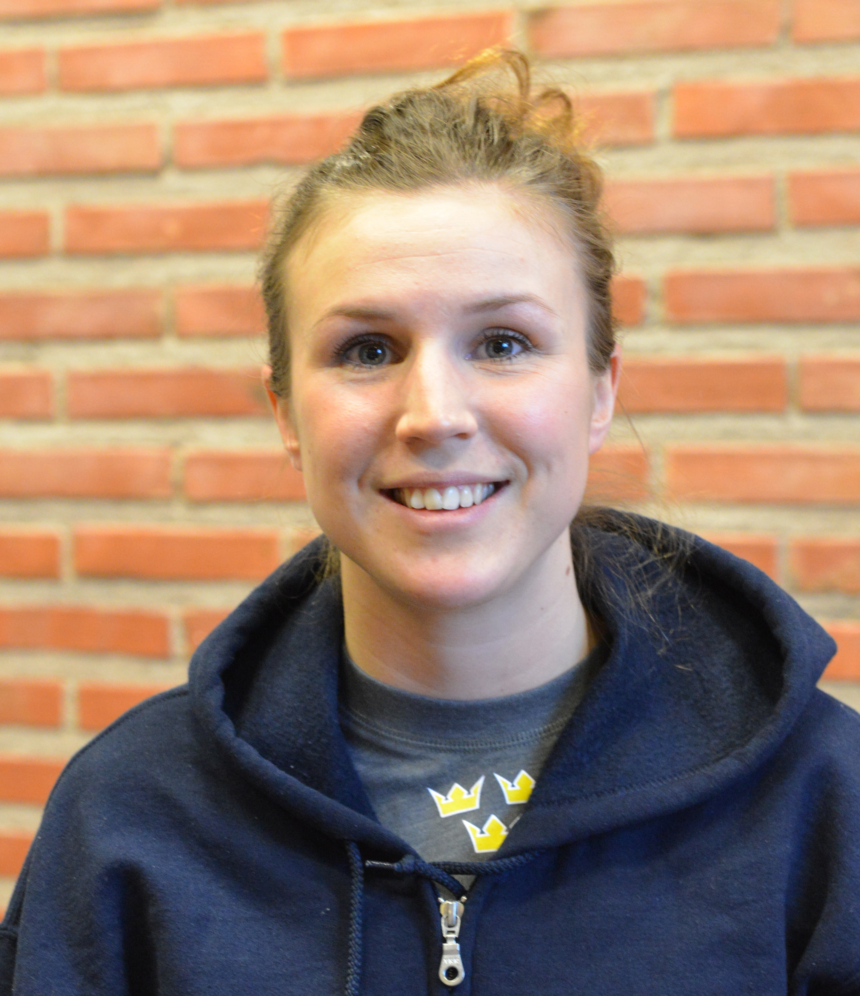 Elin Lundberg i samband med träningsturnering i Oskarshamn februari 2016.